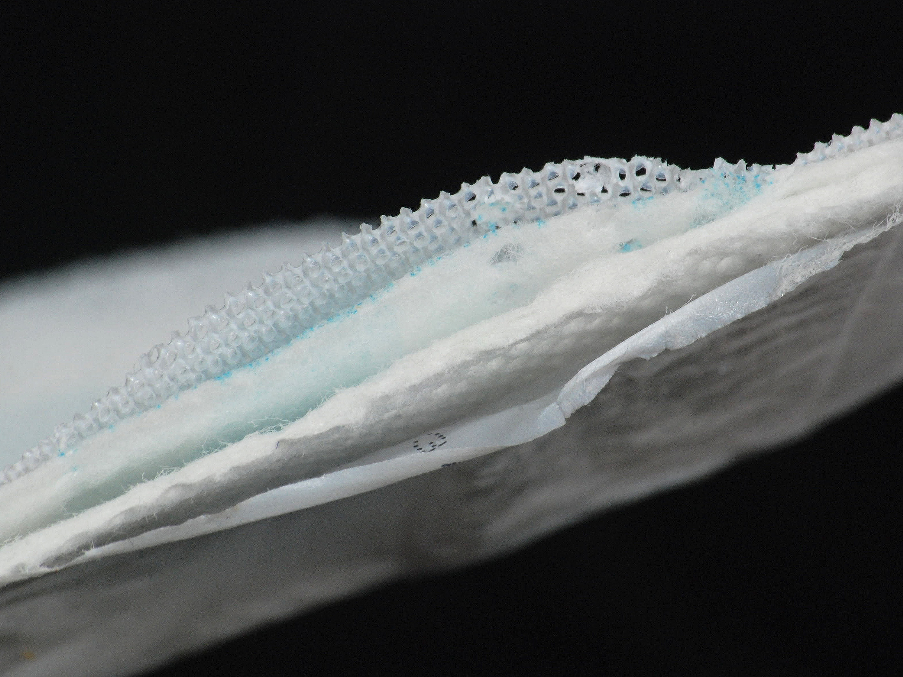 Hygienické vložky Řez hygienickou vložkou